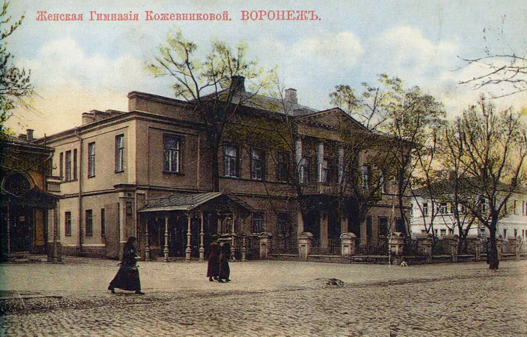 дореволюционная открытка